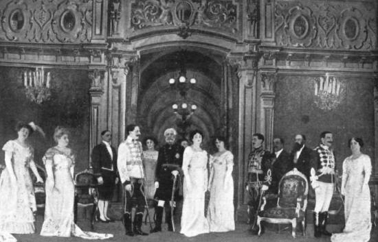 Escena de la obra de teatro La escuela de las princesas, del dramaturgo español Jacinto Benavente.